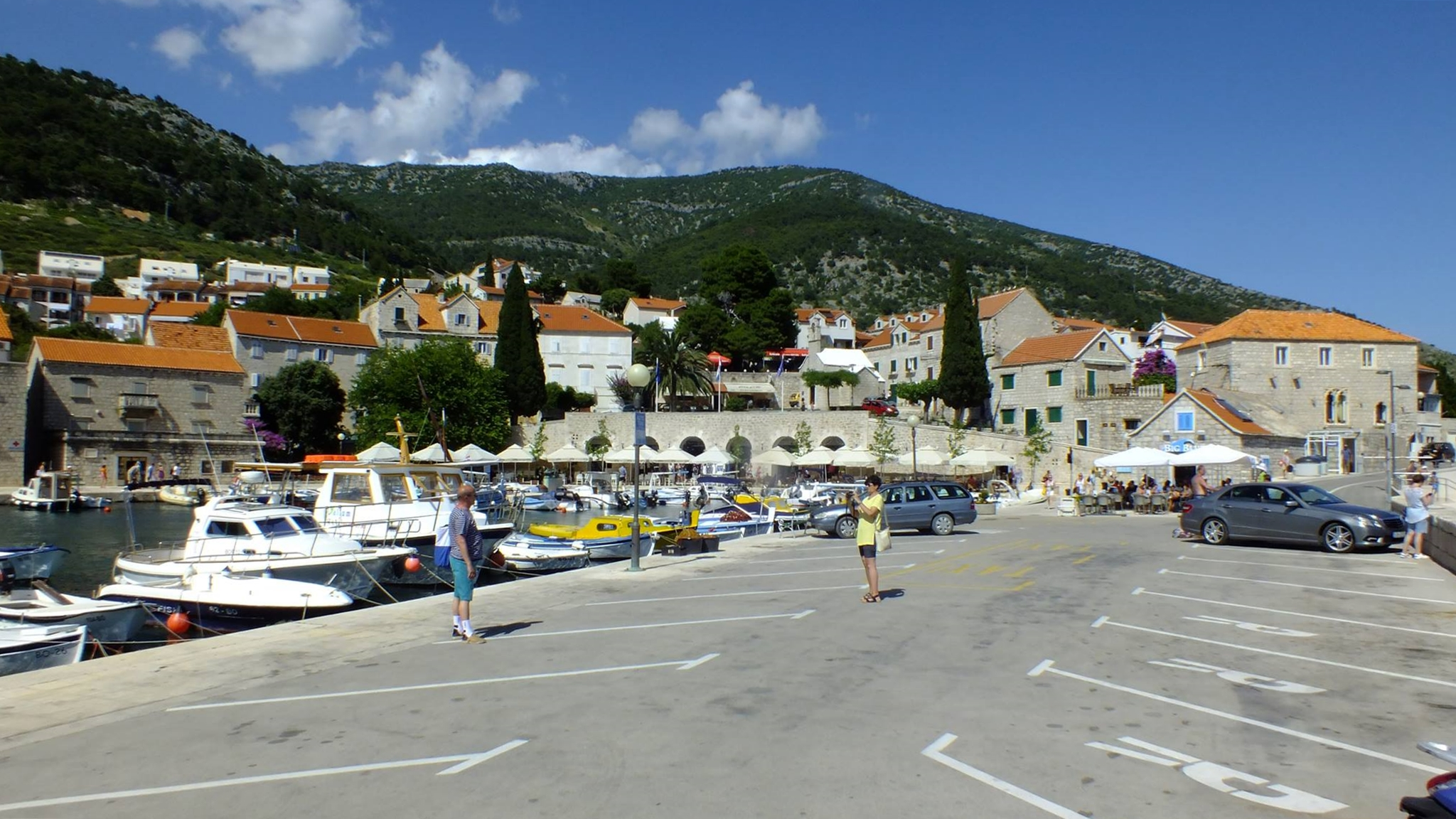 Městečko Bol